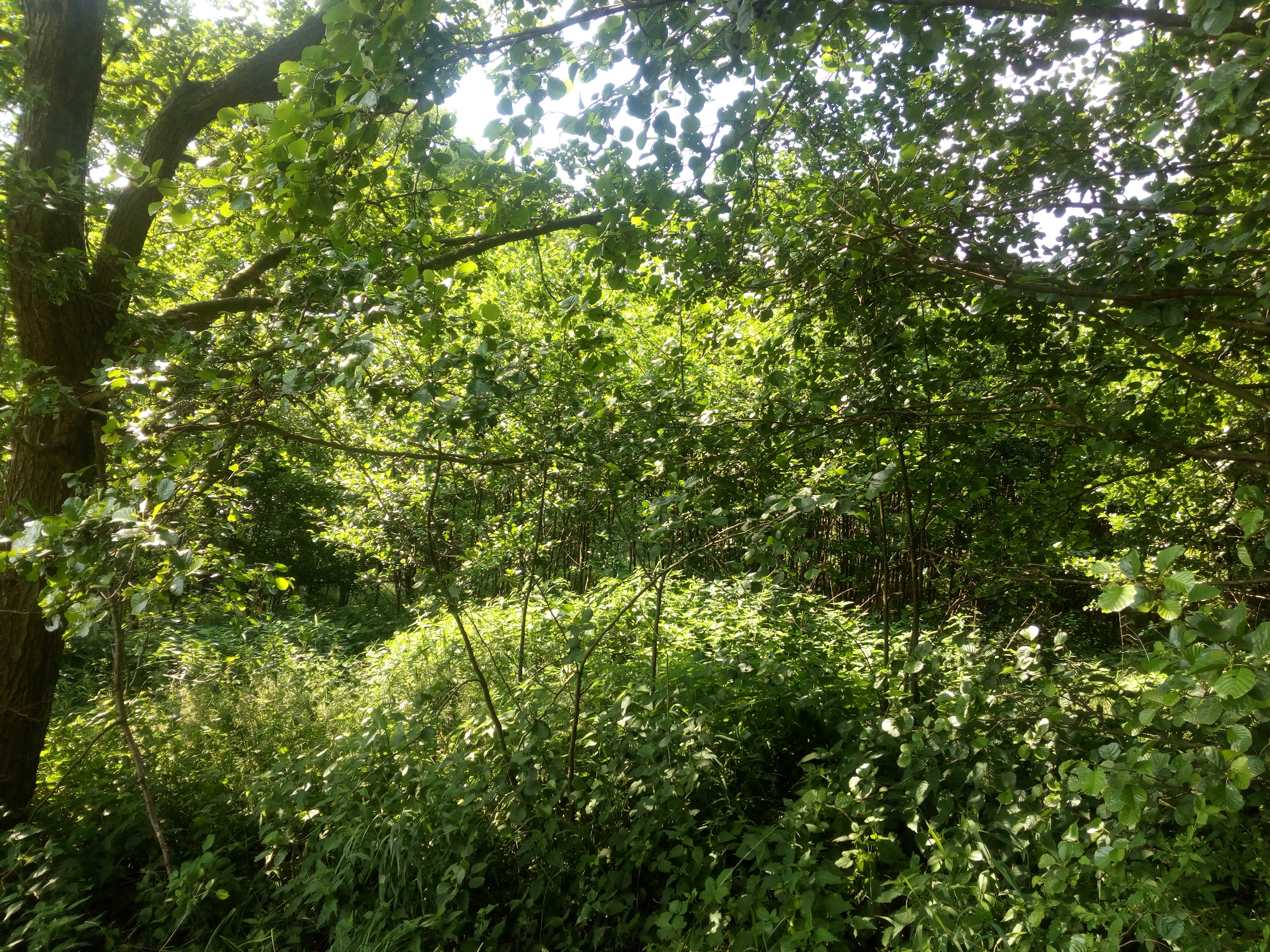 Etwas außerhalb von Siedlungen liegt dieses Waldgebiet am Lohhakensweg. Es ist sehr kompakt und lebendig. Ich sah dort ein Rehkitz springen.